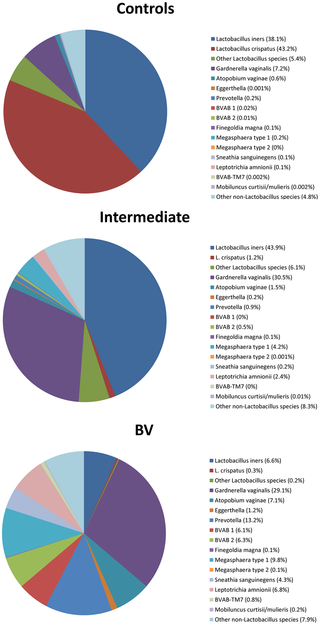 Composition du microbiote vaginal chez des femmes porteuses d'une vaginose : flore normale (Controls) , flore intermédiaire (Intermediate), flore en cas de vaginose bactérienne (BV)